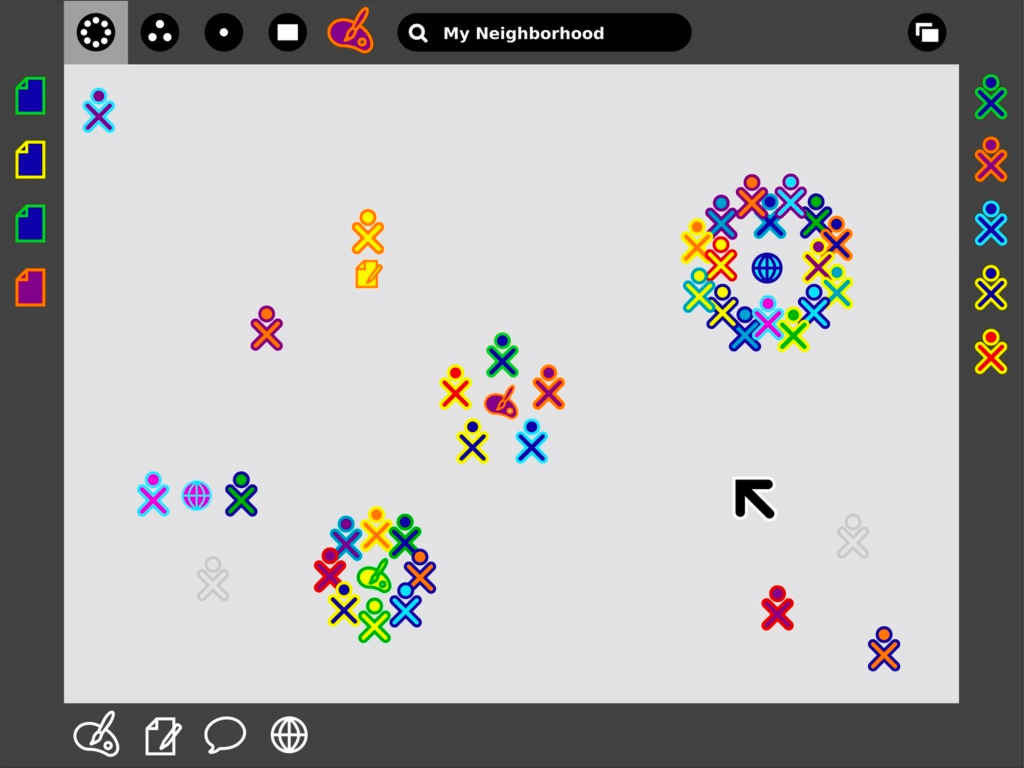 OLPC - mesh network - neighborhood view